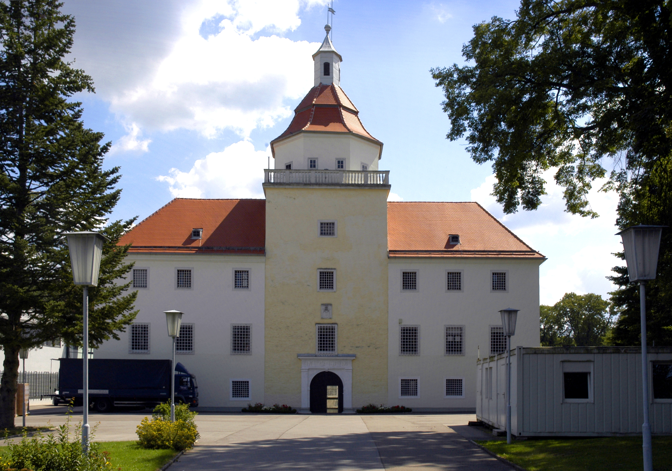 ehemaliges Schloss Sonnberg, Justizanstalt, Westfassade